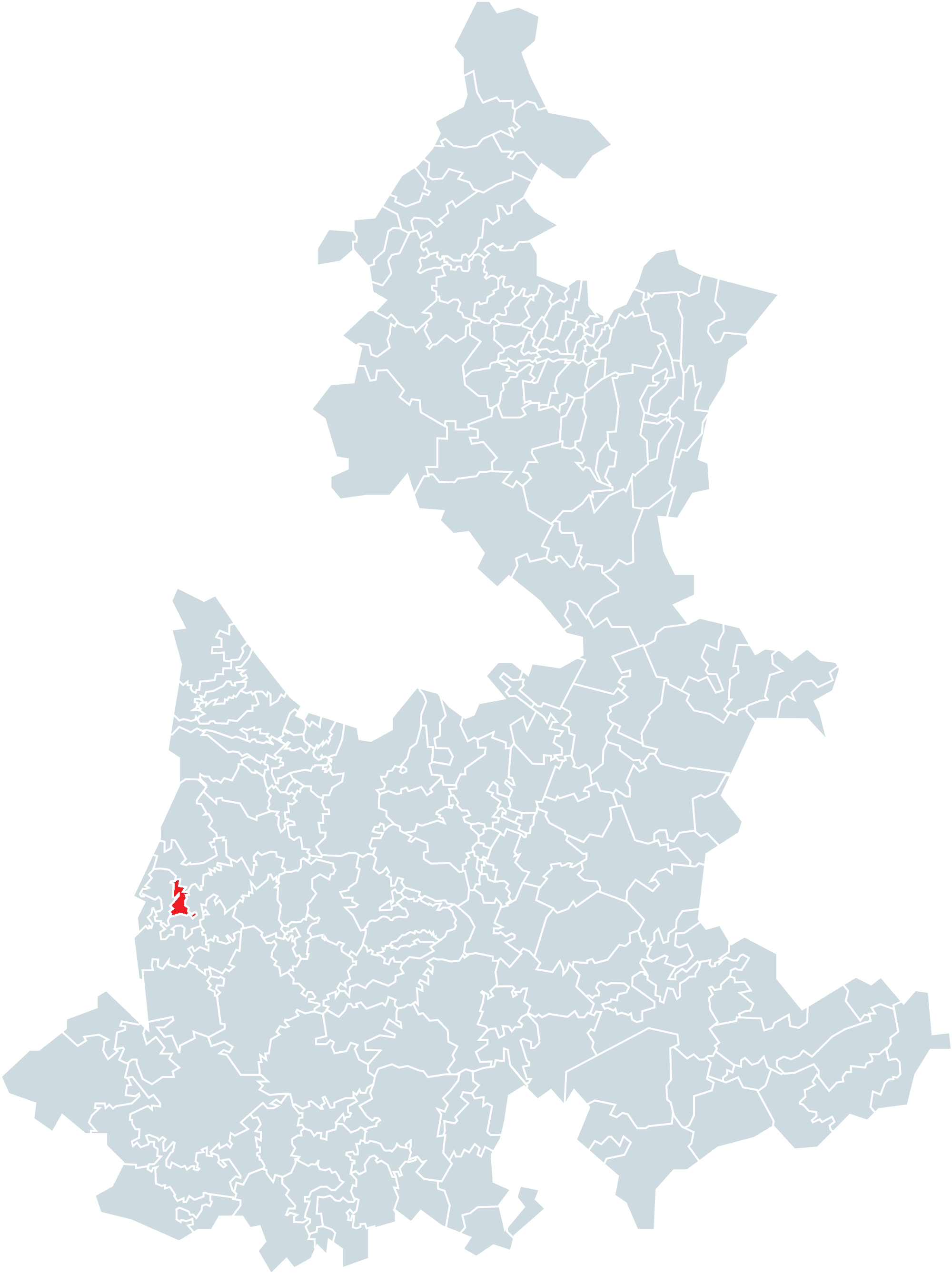 Municipio de Tepemaxalco